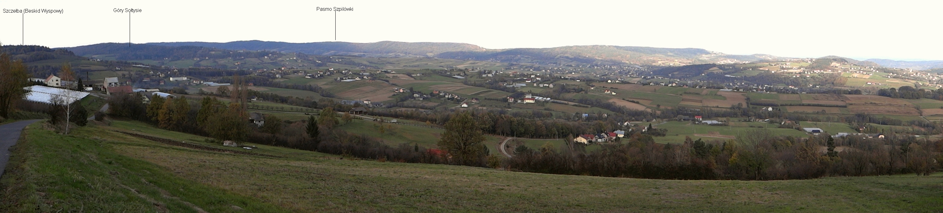 Dolina potoku Białka na granicy Beskidu Wyspowego i Pogórza Wśnickiego. Widok spod dworu w Kątach